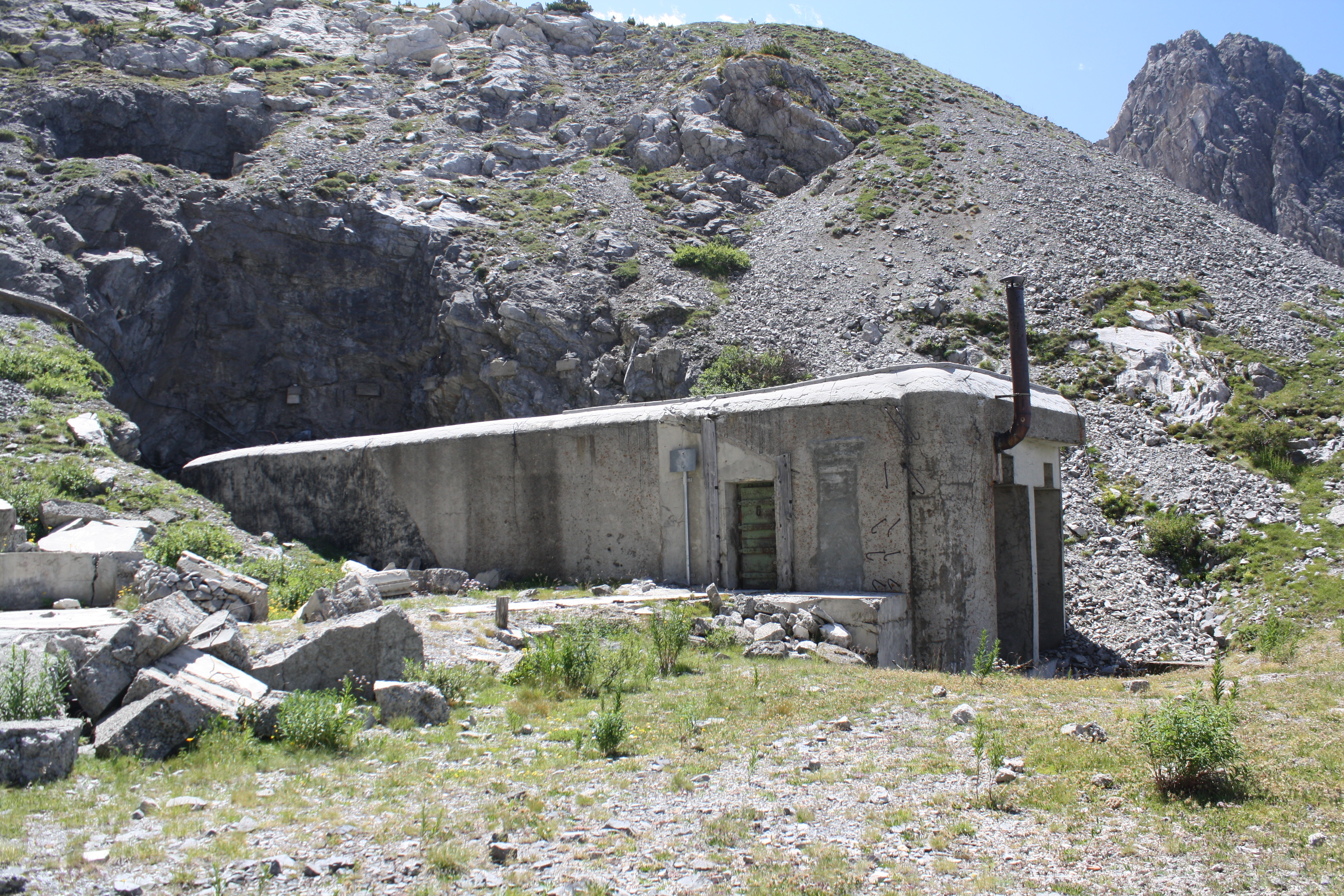 L'entrée vue du coté de l'entrée téléphérique de l'ouvrage du Pas du Roc